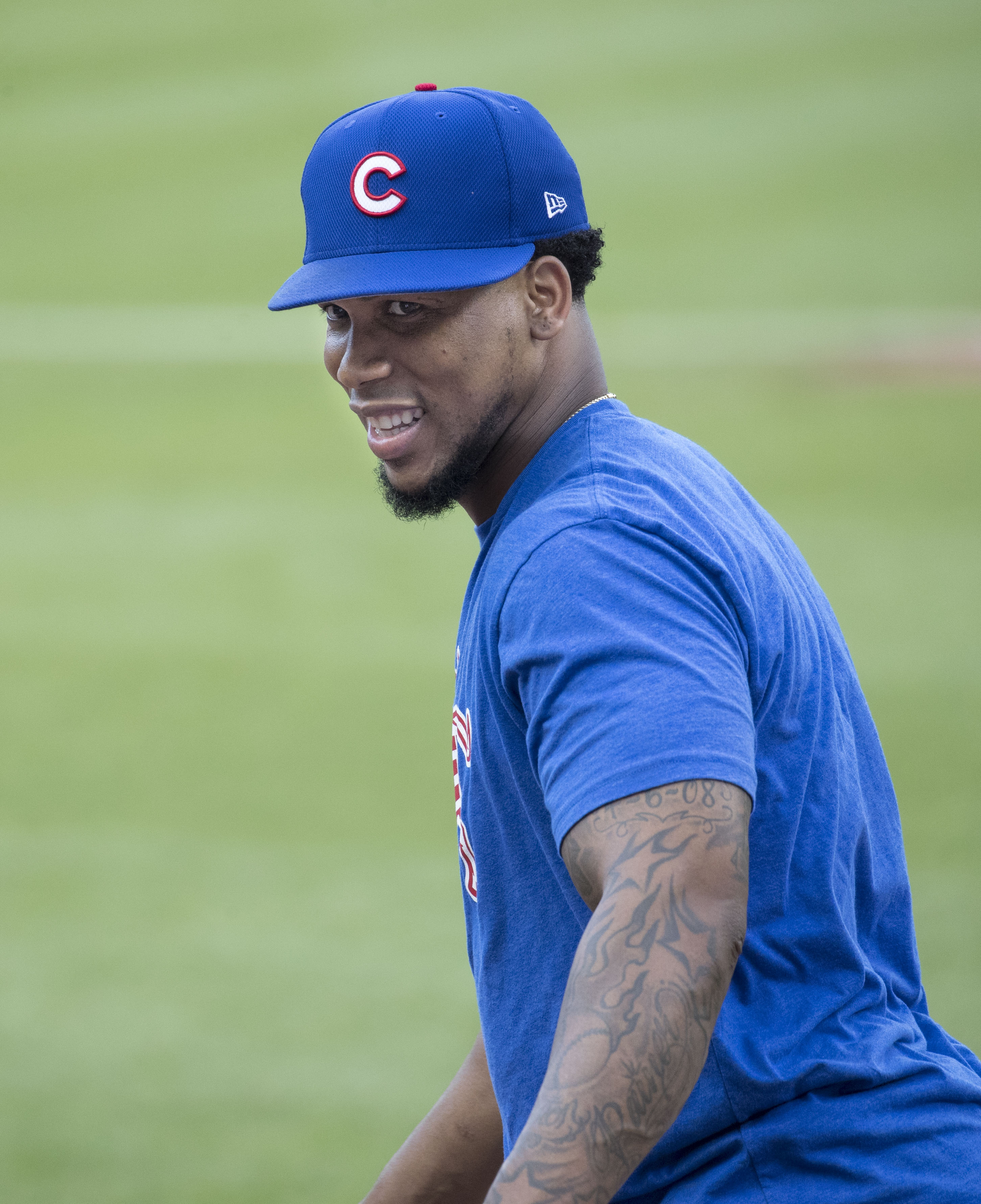 Cubs at Orioles 7/15/17